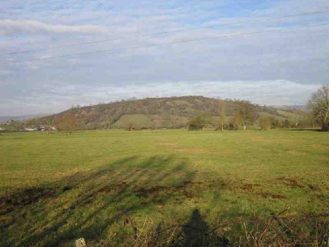 Ben Knowle Hill